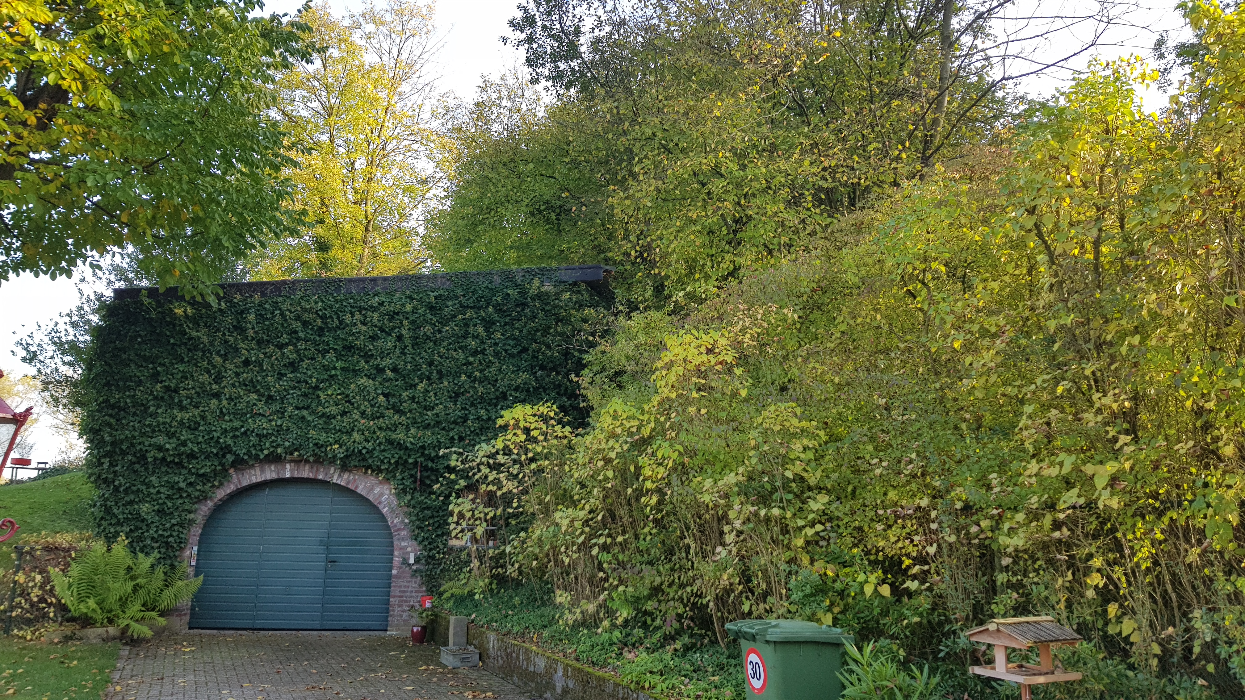 Kalkoven Engwegen, Schin op Geul, Nederland